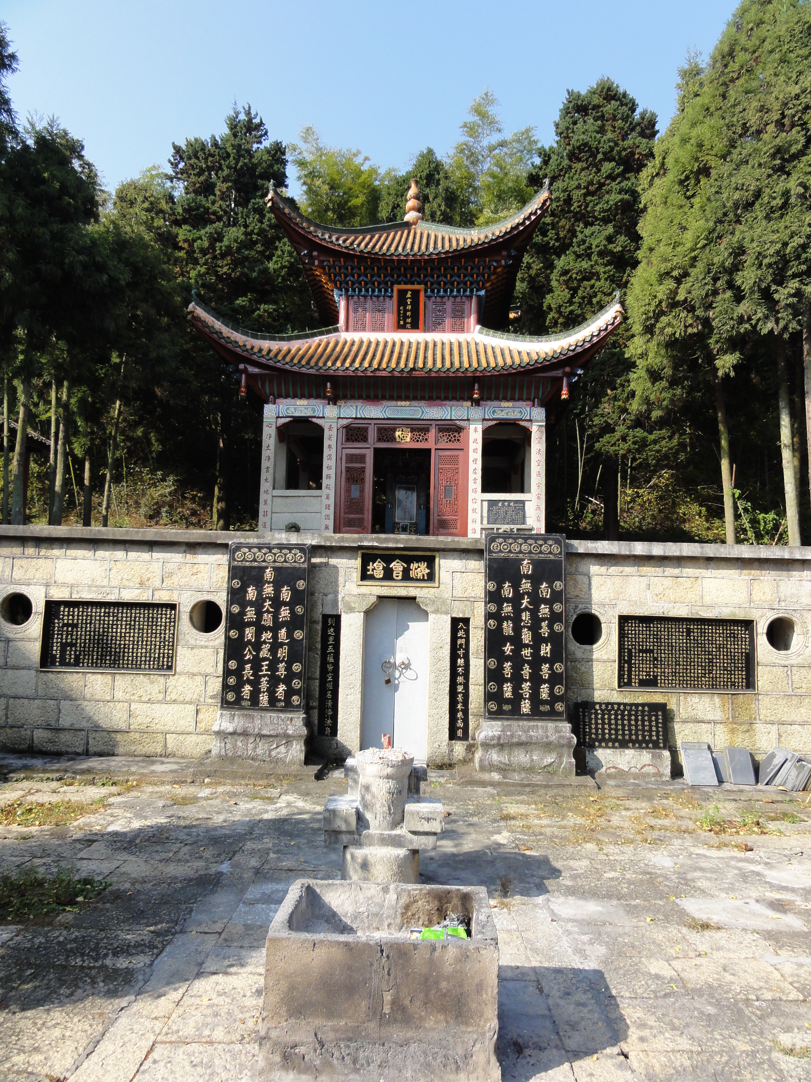 中國近代中興禪宗高僧虛雲老和尚的祖師塔，位於雲居山趙州關外的海會塔坪上。